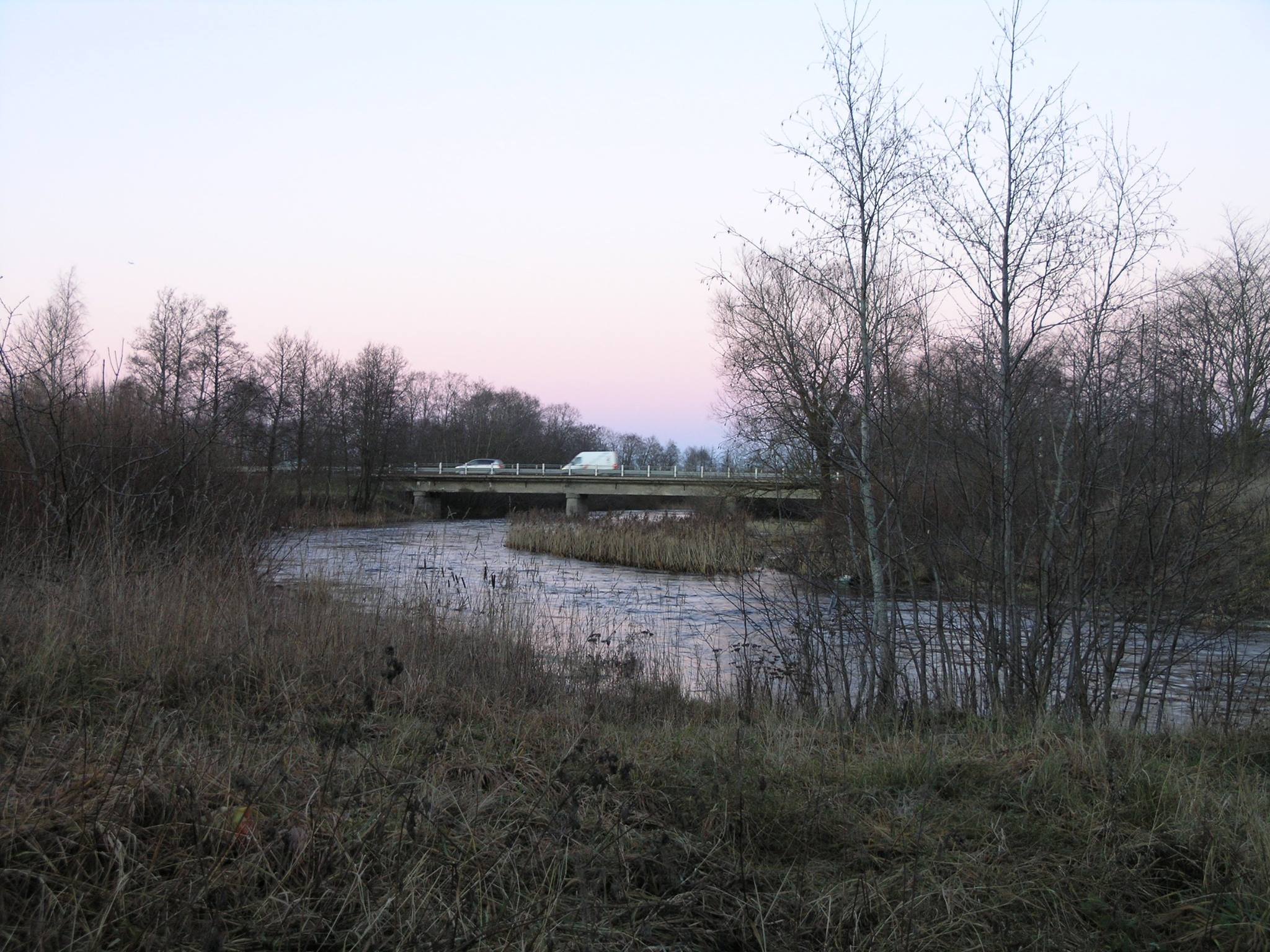 Keila maanteesild.